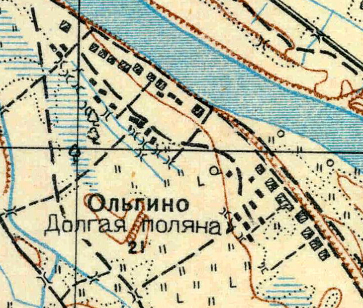 Топографическая карта Ленинградской области, квадрат О-35-21-Г-а (Орлы), деревня Дальняя Поляна.